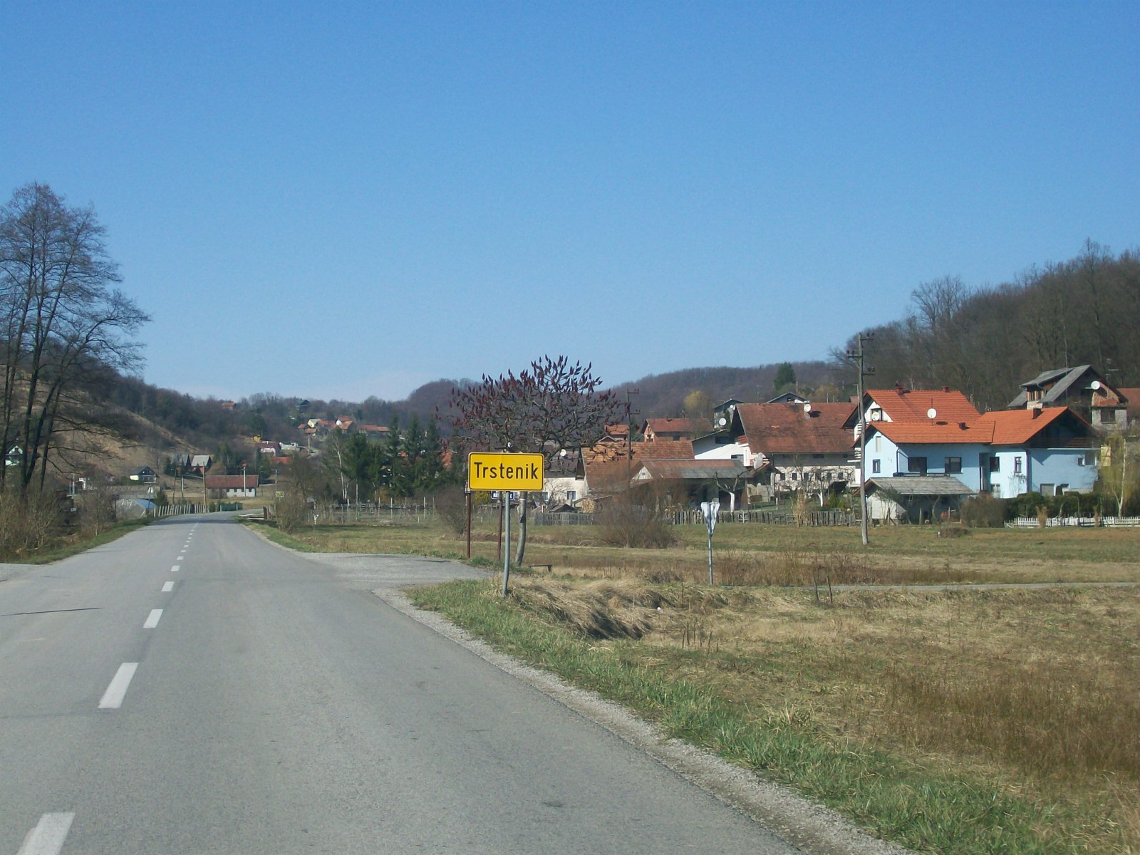 Trstenik, Marija Gorica, Zagrebačka županija